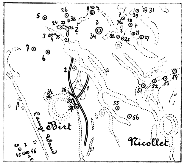 Astronomische Beobachtungen an der k. k. Sternwarte zu Prag in den Jahren 1892–1899 nebst Zeichnungen und Studien der Mondoberfläche nach photographischen Aufnahmen. Mit 3 Tafeln in Heliogravure, 11 Tafeln in Phototypie, 2 Tafeln in Lichtdruck, 2 Tafeln in Lithographie und 12 Abbildungen im Texte.